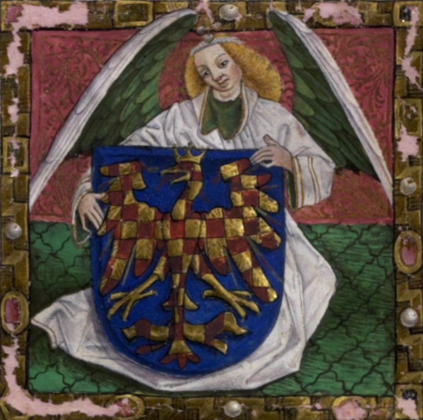 MZA v Brně, fond A 1 Stavovské listiny, inv. č. 368. Miniatura